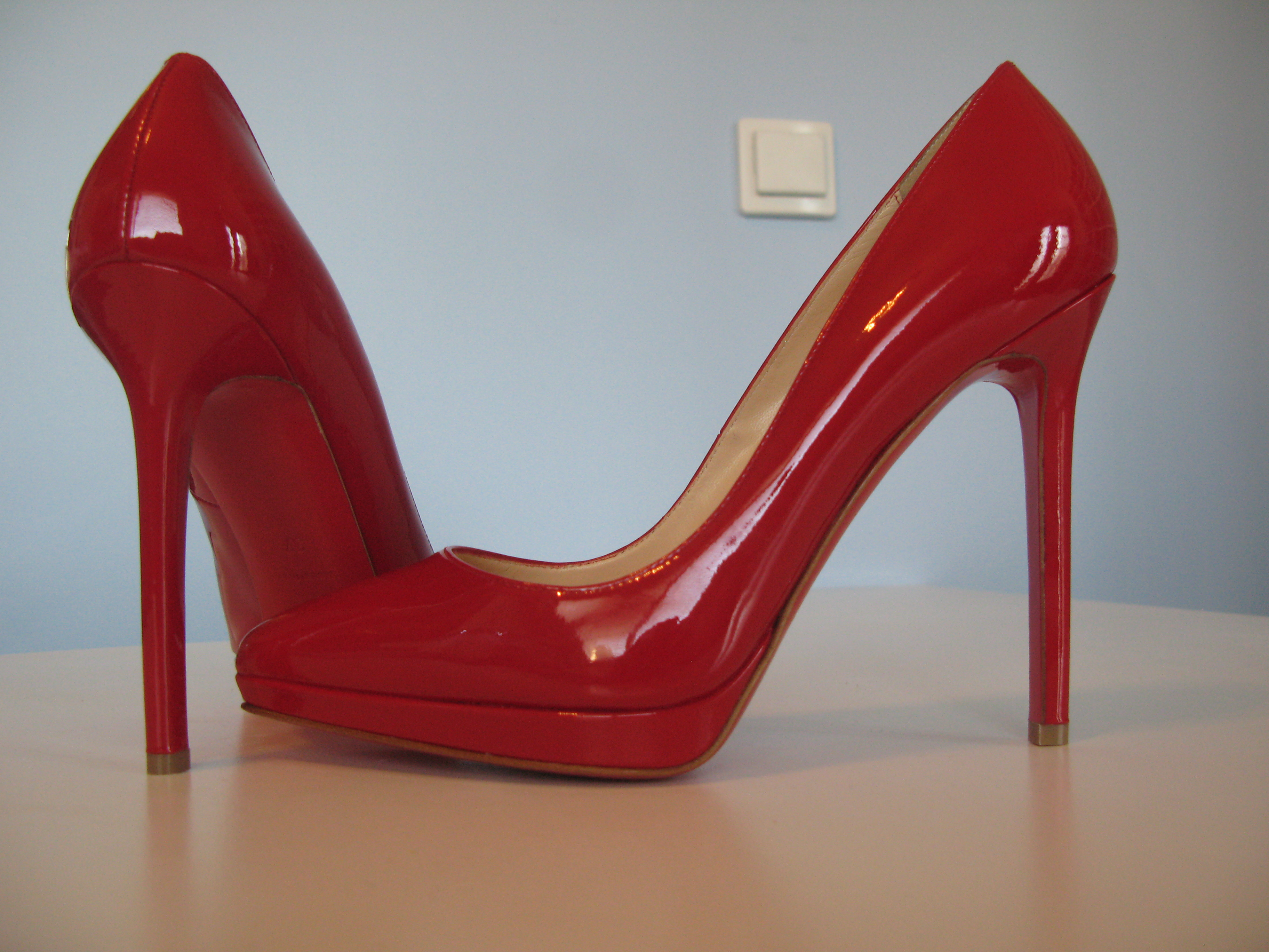 Chaussure Christian Louboutin, modèle Pigalle Plato 120mm, couleur "coquelicot"